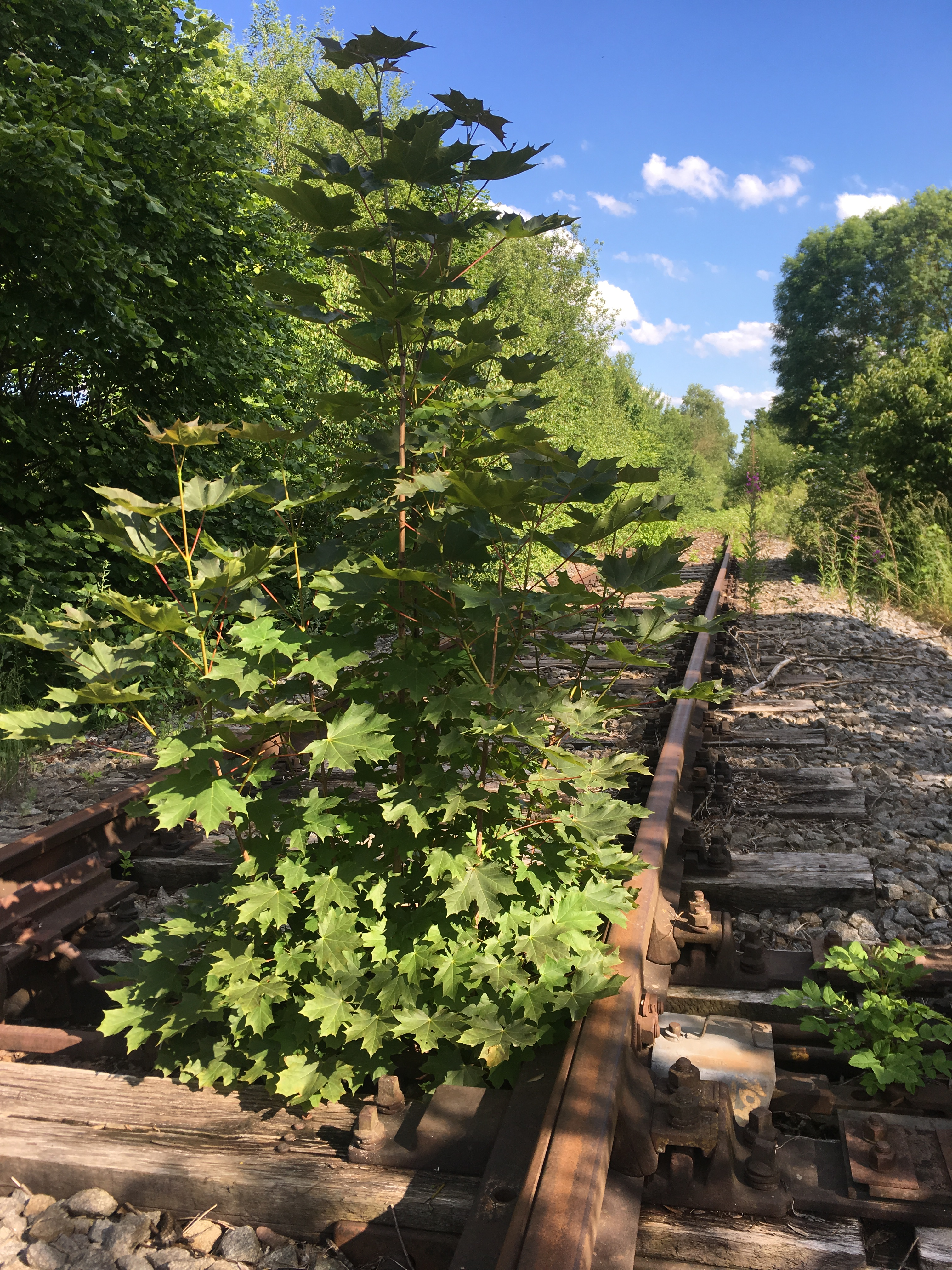 Zustand der Bahnstrecke Nördlingen–Dombühl am 13.06.2019 südlich des Bahnübergangs Luitpoldstraße Dinkelsbühl bei km 30,5